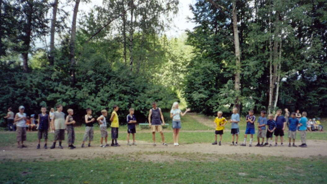 Вожатые проводят зарядку в ДОЛ им. Железнякова (Московская область), 2005 г.